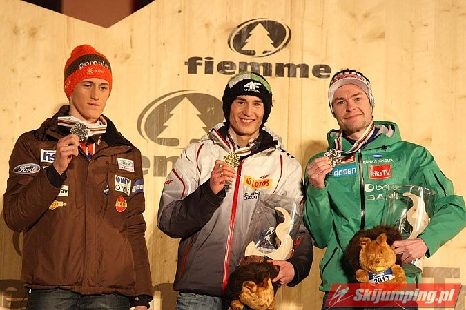 Dekoracja medalowa konkursu indywidualnego mężczyzn na skoczni K-120